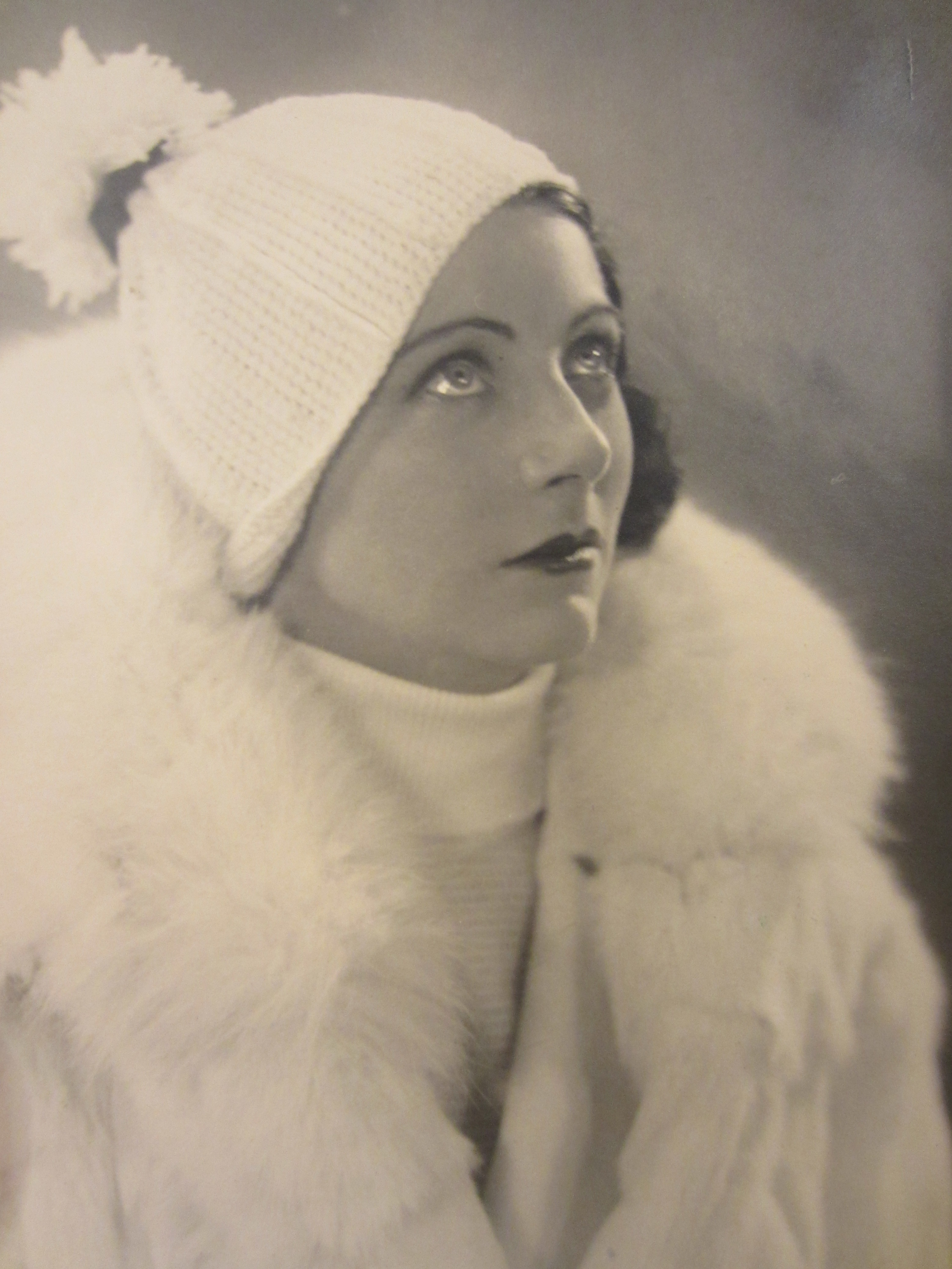 Dora Söderberg 1899-1990 var en svensk skådespelare. Hon var äldsta dotter till författaren Hjalmar Söderberg. g.m. Rune Carlsten och mor till Rolf Carlsten.